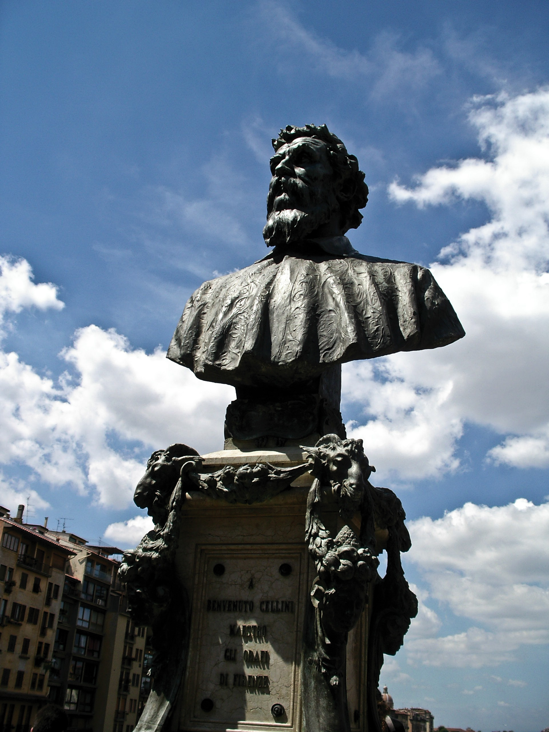 Monumento al artista Benvenuto Cellini, obra de Raffaello Romanelli (1901). Ponte Vecchio, Florencia.